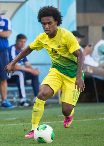 Динамо - Анжи (19.07.2013)